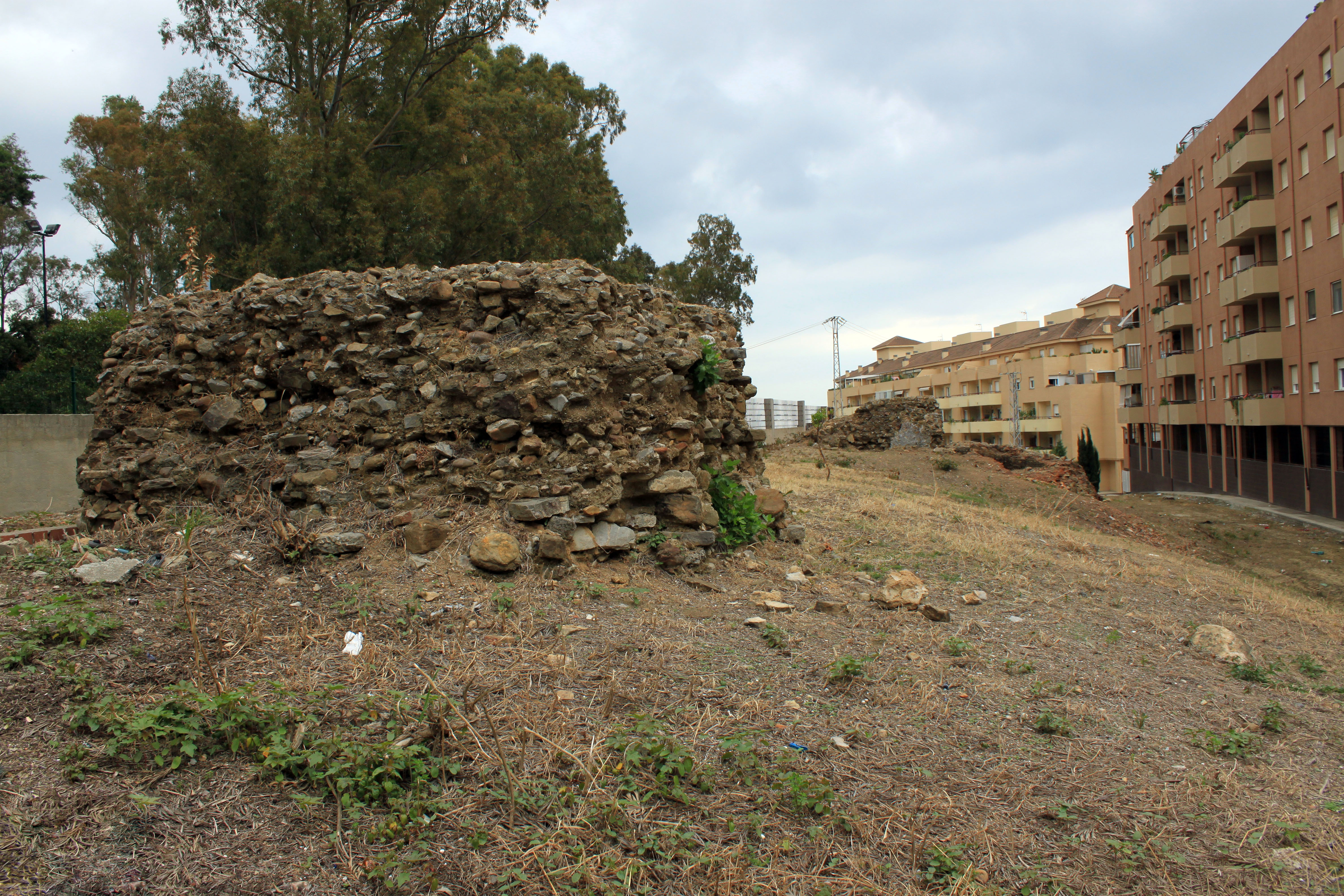 Huerta en Carmen de la localidad andaluza de Algeciras. En primer plano restos de la denominada Torre 1 del sistema de murallas de la Villa Nueva, detrás restos de la torre 2 y del horno alfarero del siglo XVIII adosado a ella.